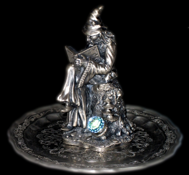 Figurka przedstawiająca Ducha Gór